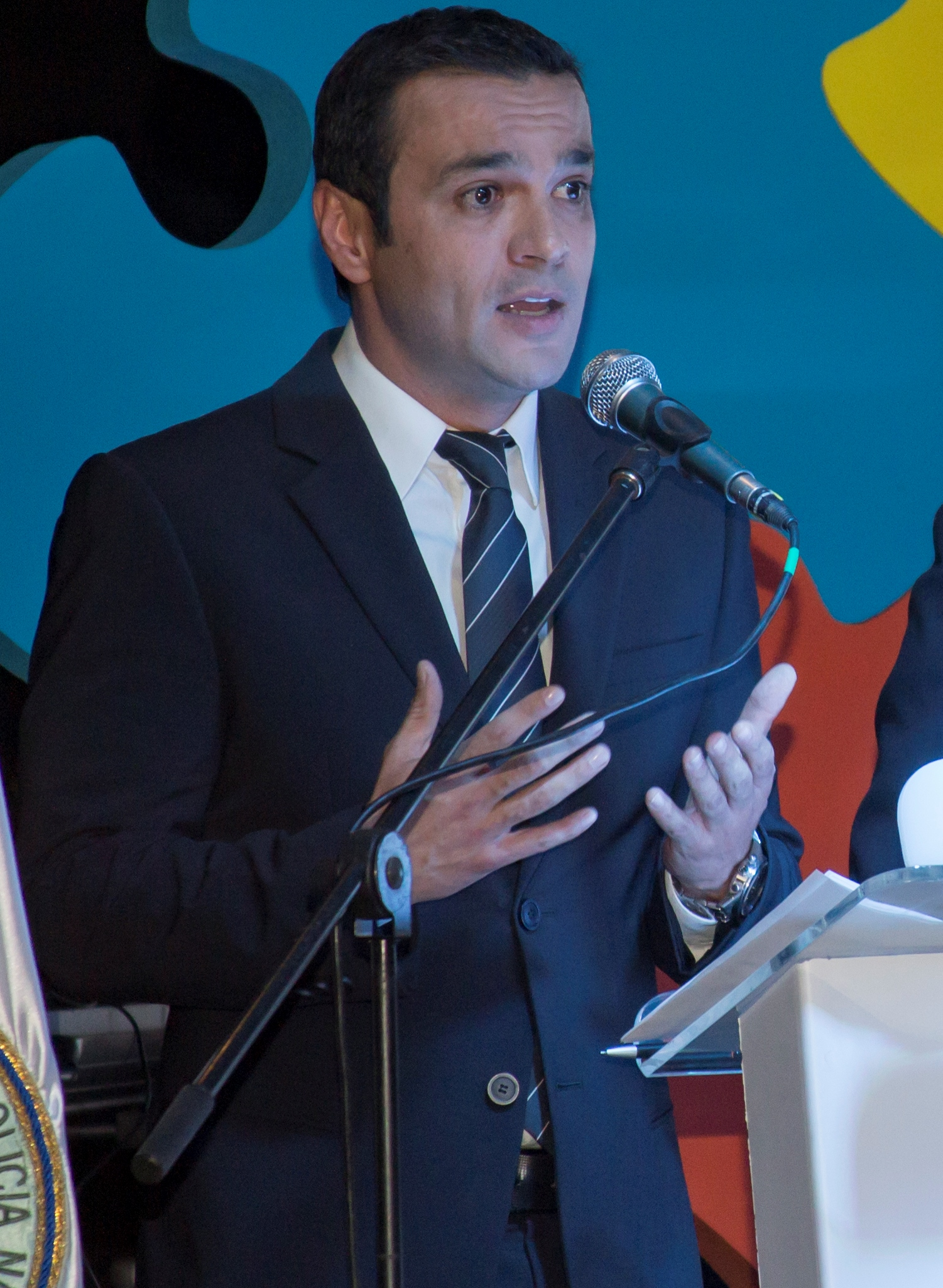 Juan Diego Alvira en Café por un futuro 2016